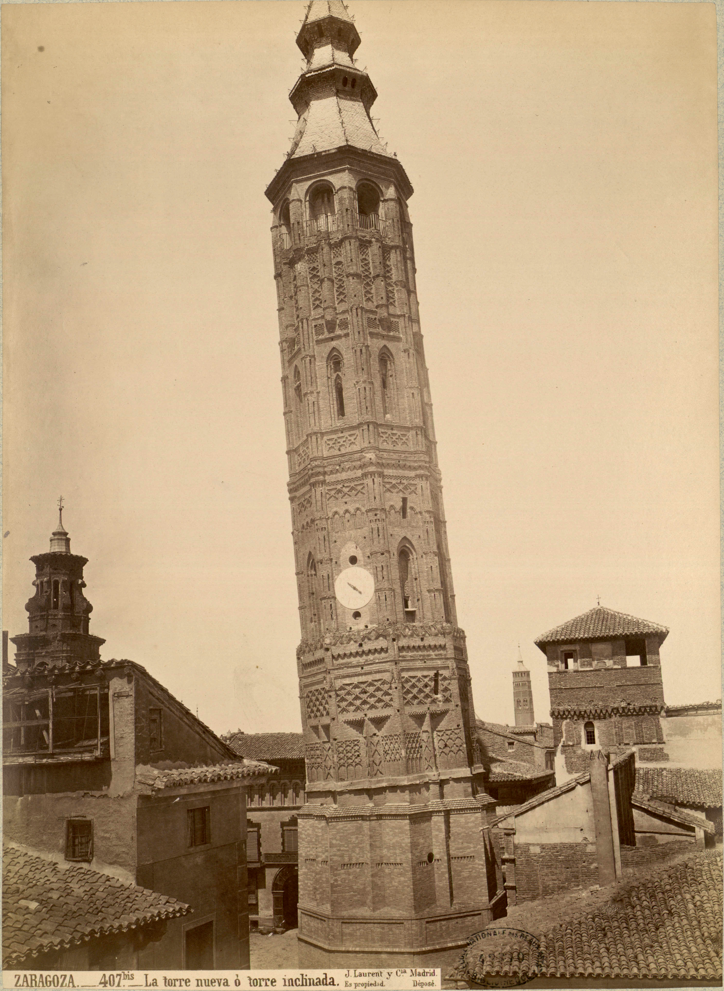 Fotografía tomada hacia el año 1876 por J. Laurent (1816 - 1886), Torre Nueva de Zaragoza, papel a la albúmina 34,1 x 25 cm.